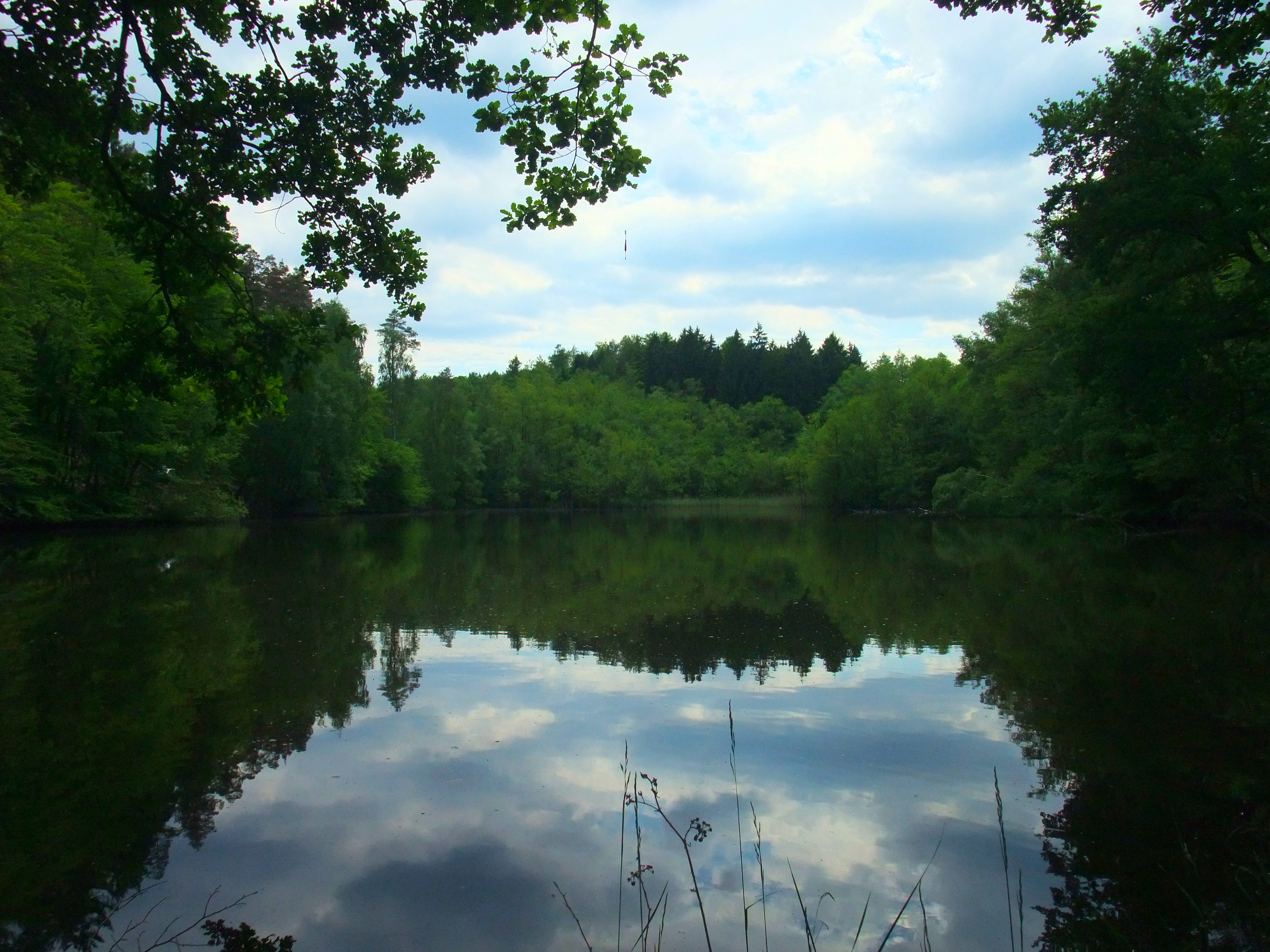 Der Krebsweiher unterhalb der Pfrimm-Quelle (südlich von Pfrimmerhof)